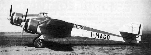 Savoia Marchetti SM.79 prototipo I-MAGO